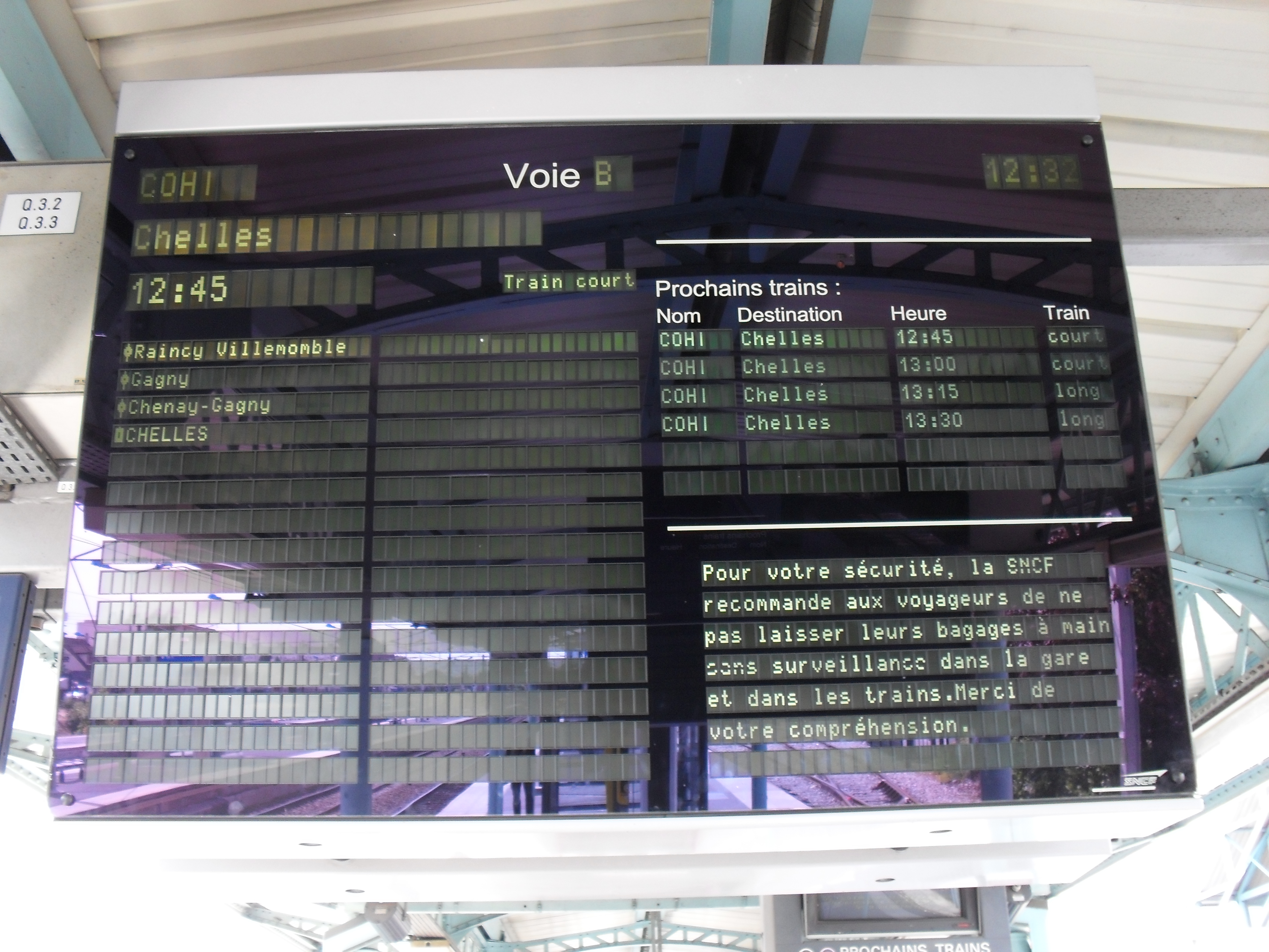 RER E - Gare de Bondy